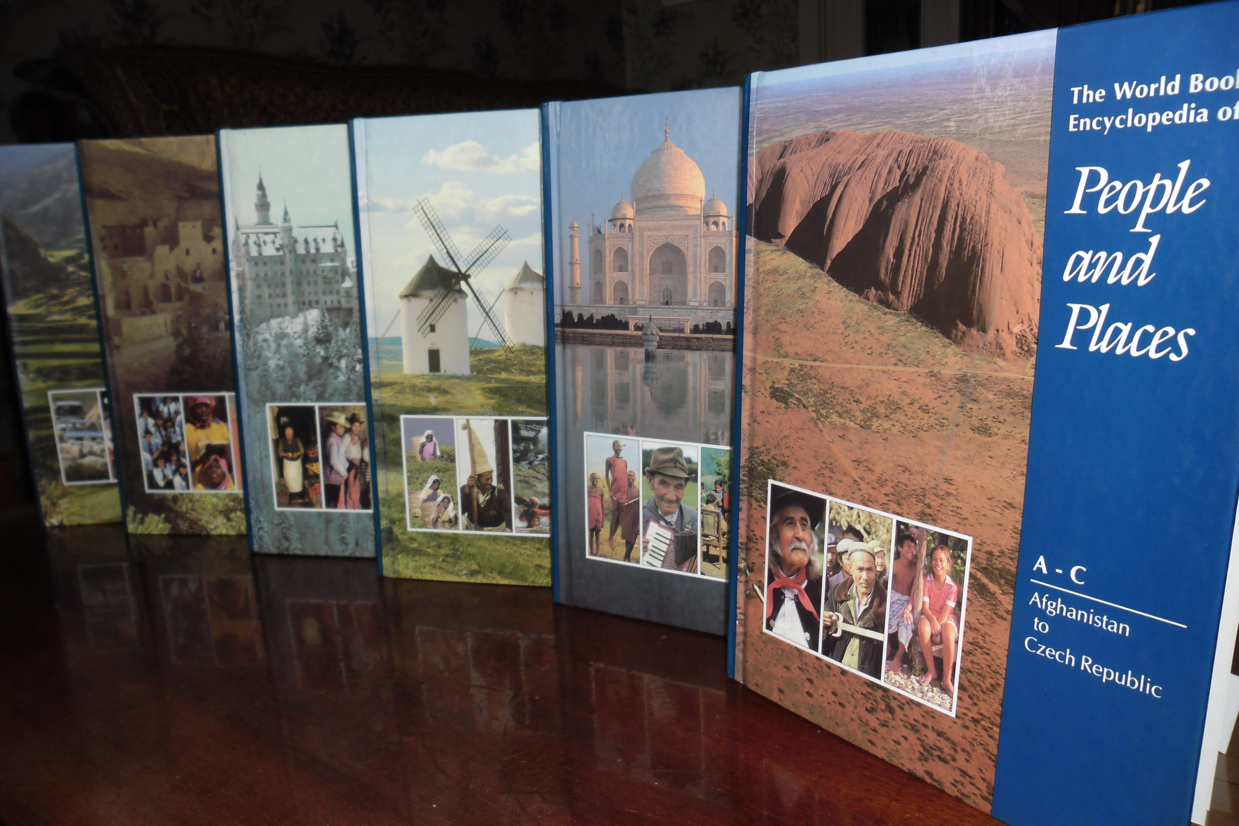 Фото